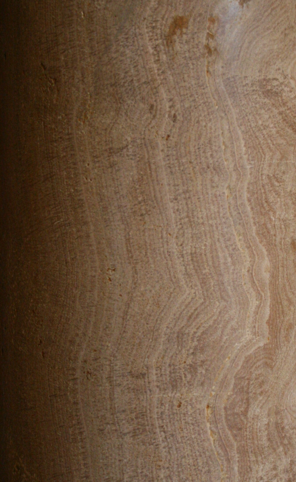 Aquäduktenmarmor